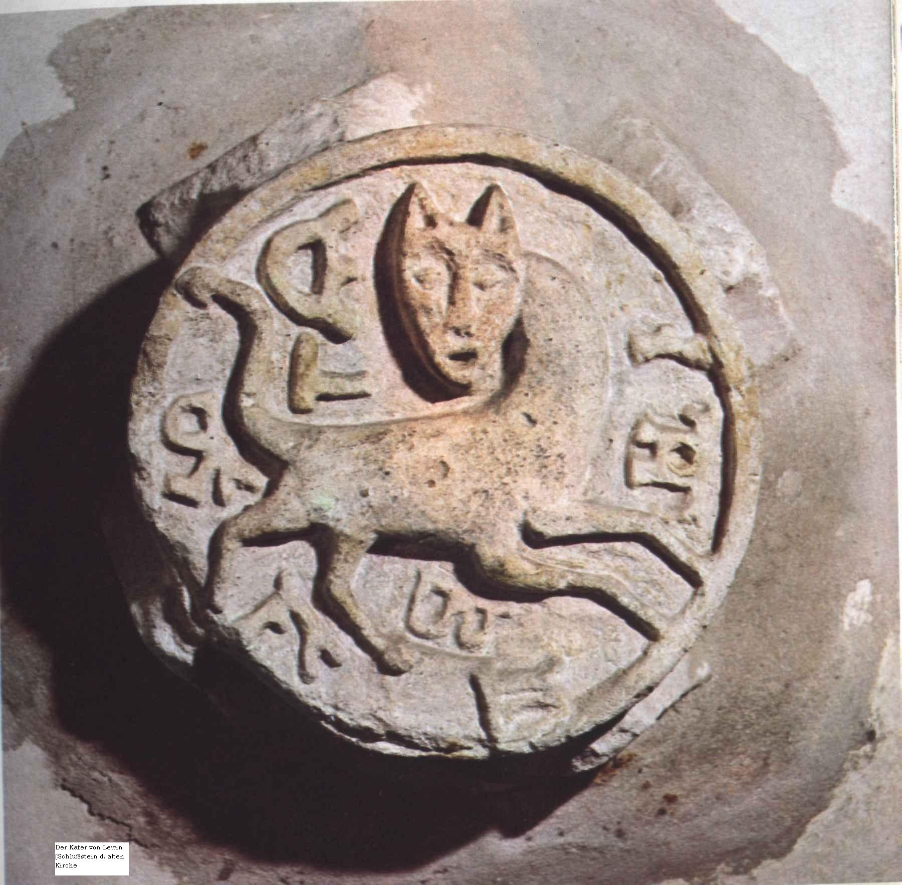 Der Kater von Lewin (Schlußstein aus d. alten Kirche)